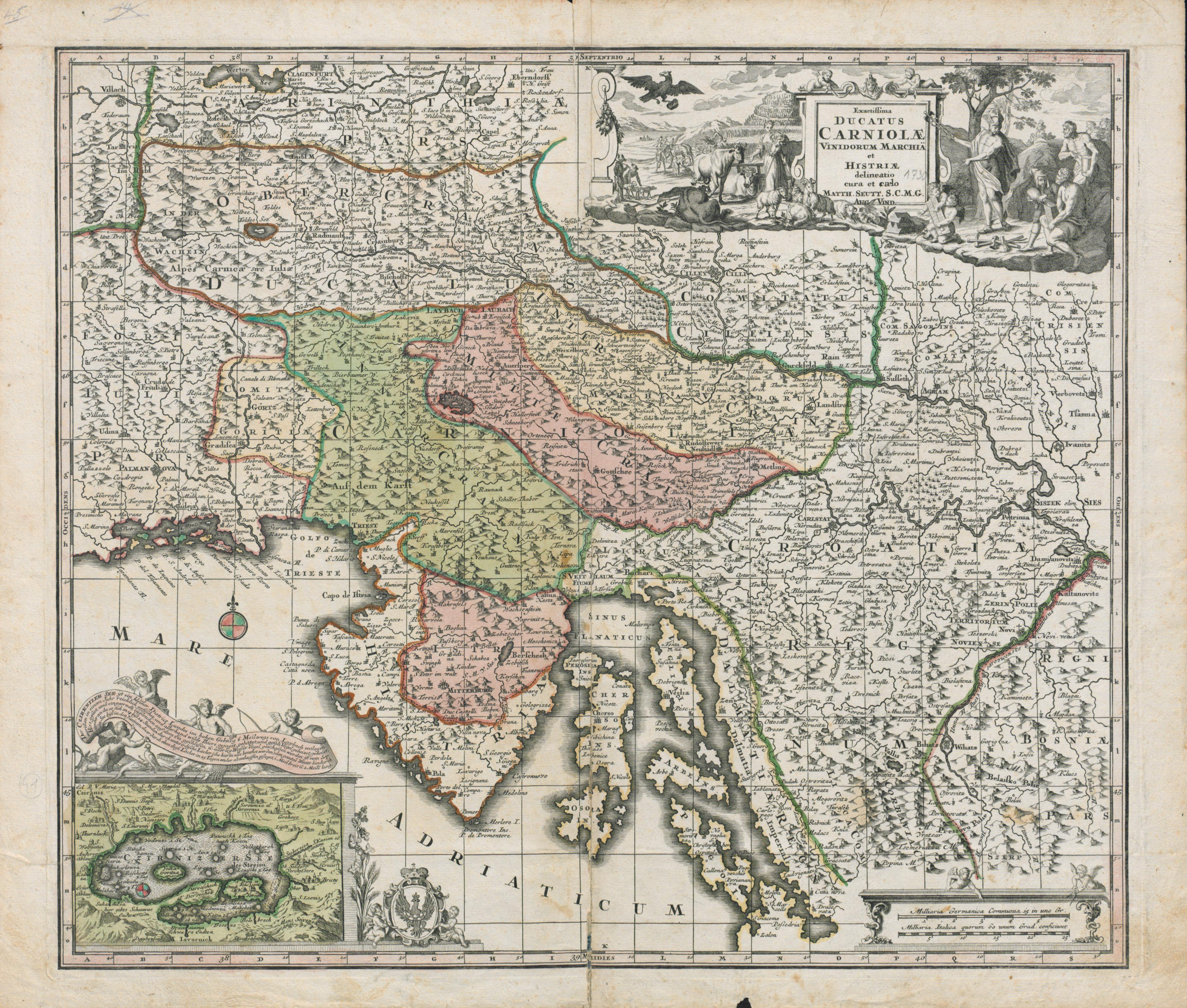 Exactissima Ducatus Carniolae Vinidorum Marchiä et Histriae.